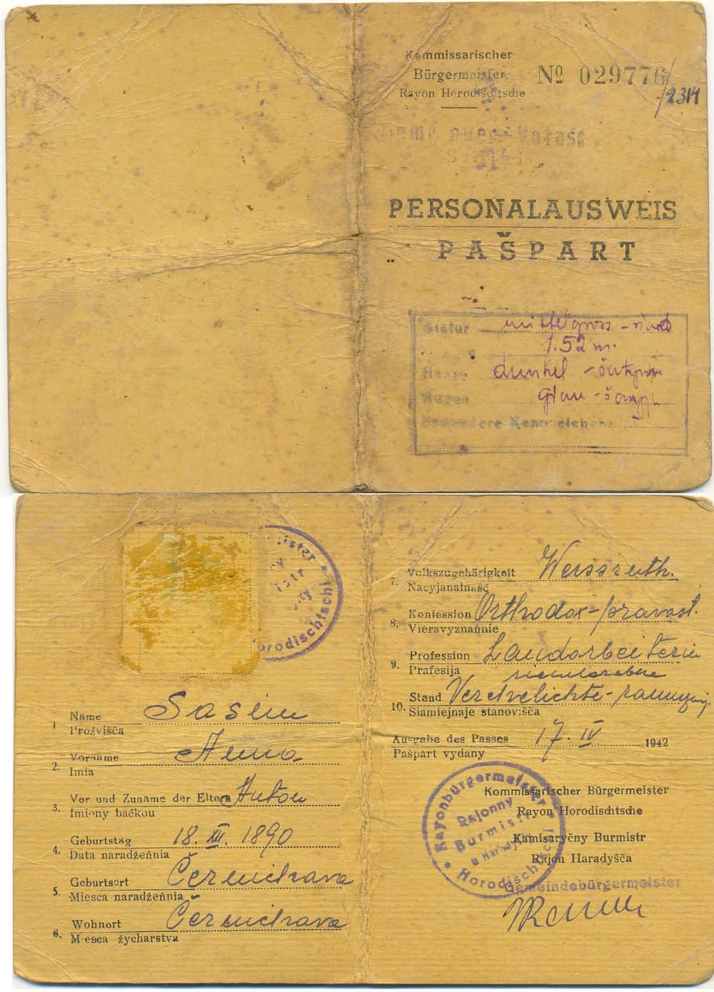 Беларуская (тарашкевіца): Нямецкі пашпарт 1942 году, выдадзены ў Гарадзішчы. На нямецкай і беларускай (лацінка) мовах